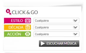 formato click&go